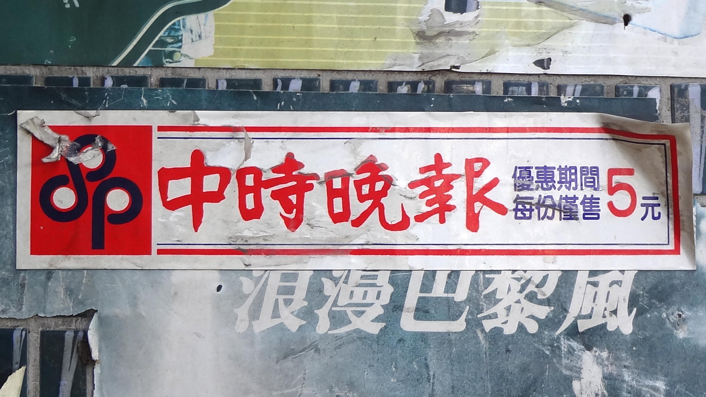 中文（台灣）: 臺北市信義區基隆路一段老舊公寓騎樓，《中時晚報》每份售價新臺幣5元廣告貼紙。2019年10月5日重訪時已不存。